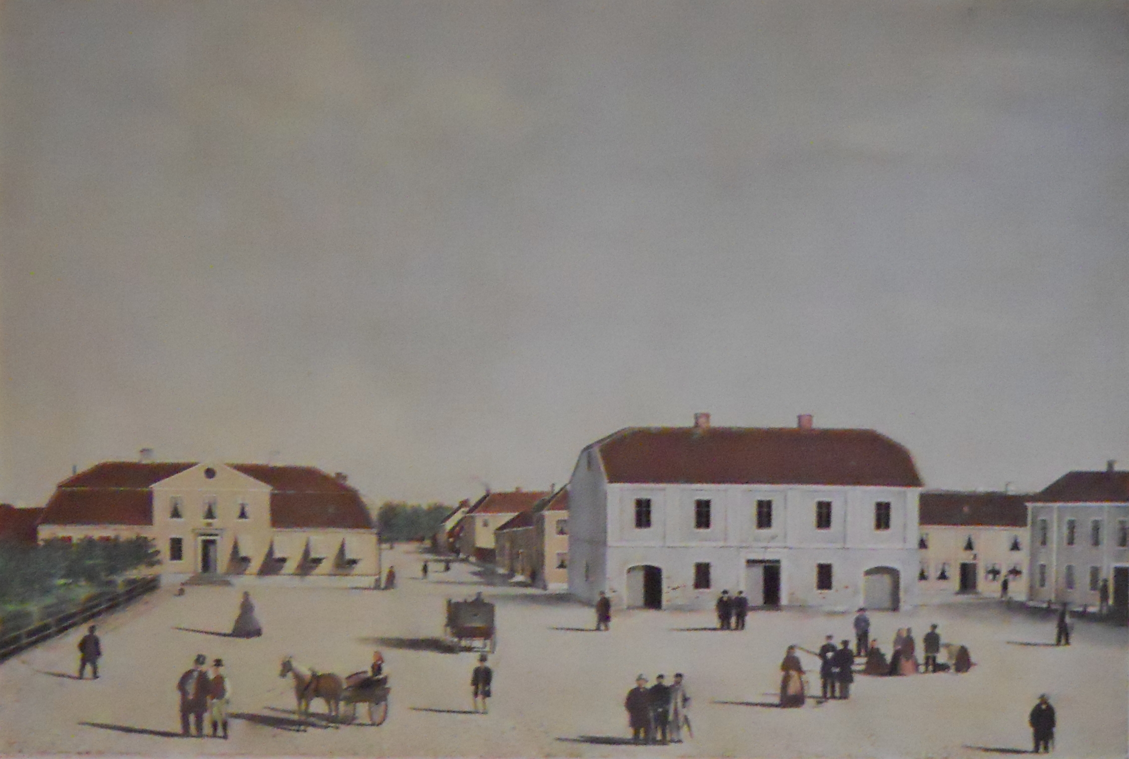 Varbergs torglabel QS:Lsv,"Varbergs torg"